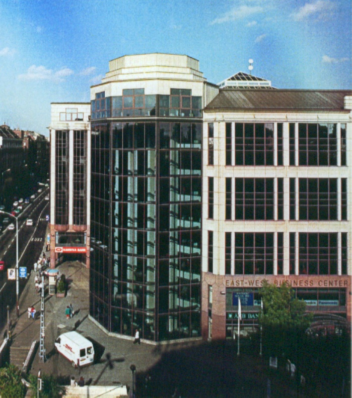 Budapest, VIII. Rákóczi út 1-3 East_West Center